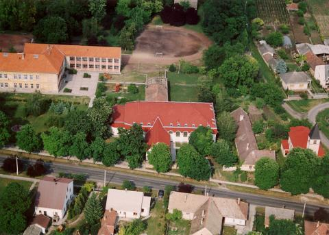 Nagydorog, Hungary, aerialphotography (Széchényi Mansion)